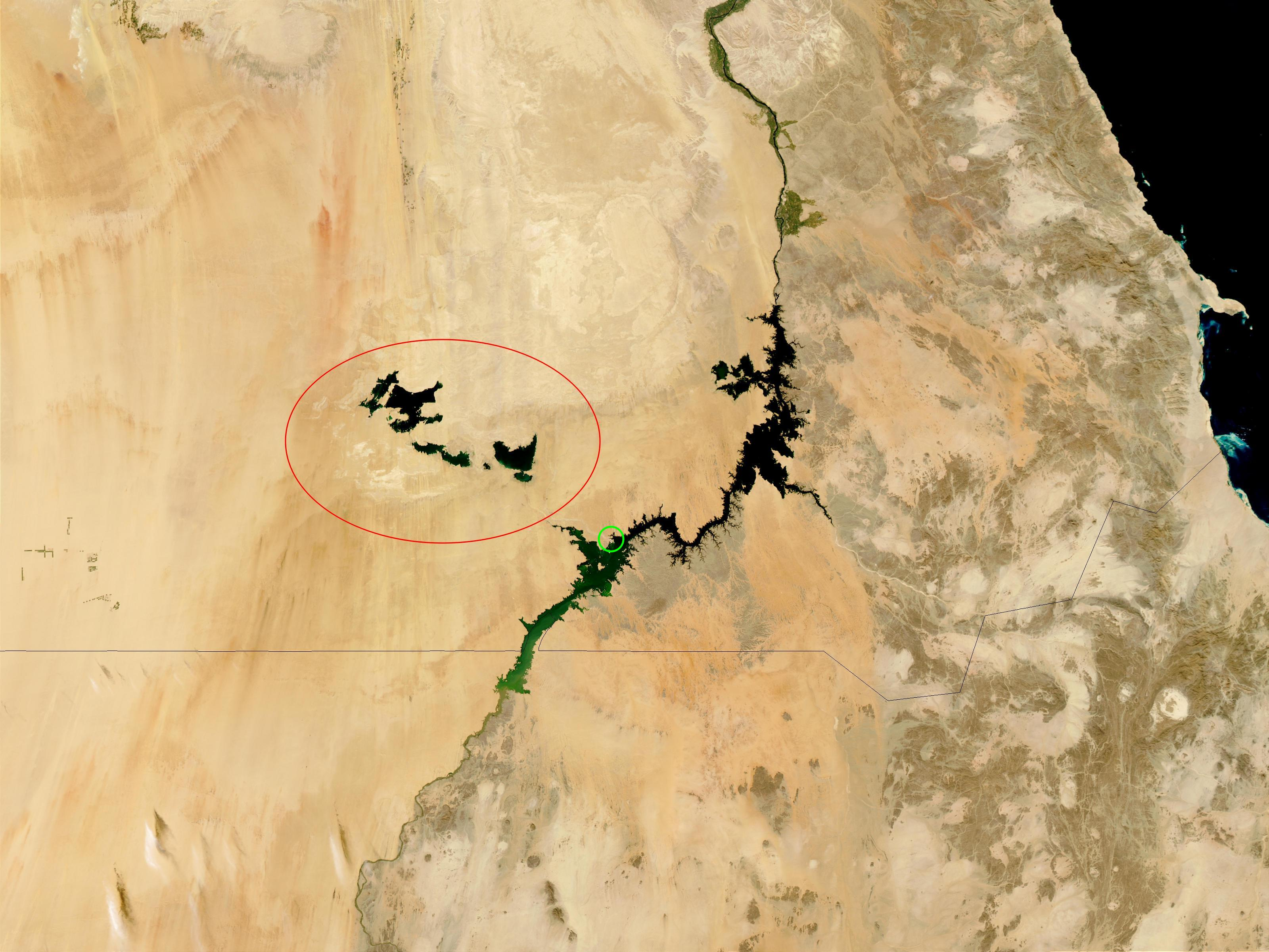 Vue satellitaire de l'Égypte et du Soudan centrée sur le lac Nasser. Les lacs Toshka sont cerclés en rouge. L'image source est : de la NASA